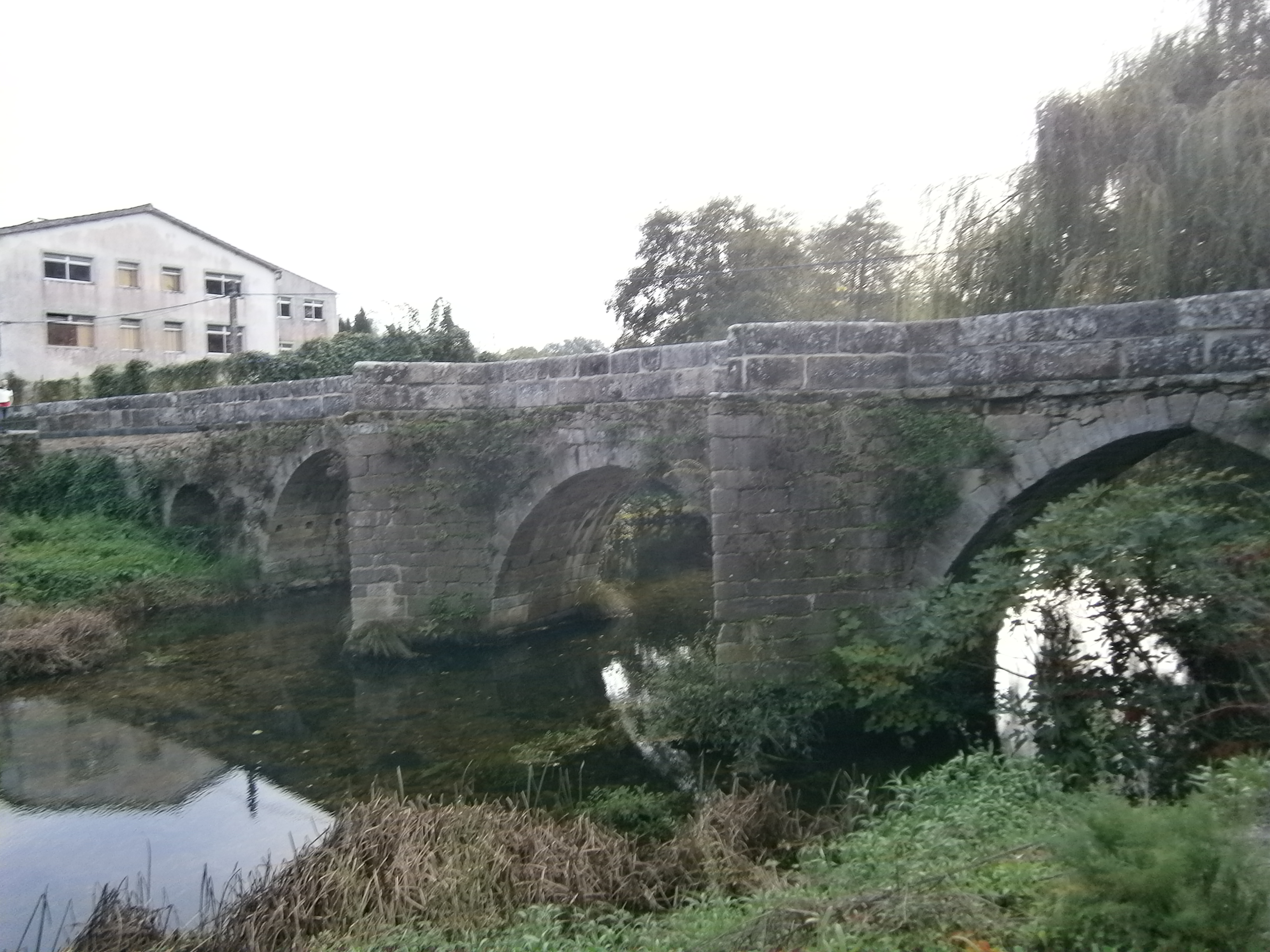 Ponte de Traba, en Noia